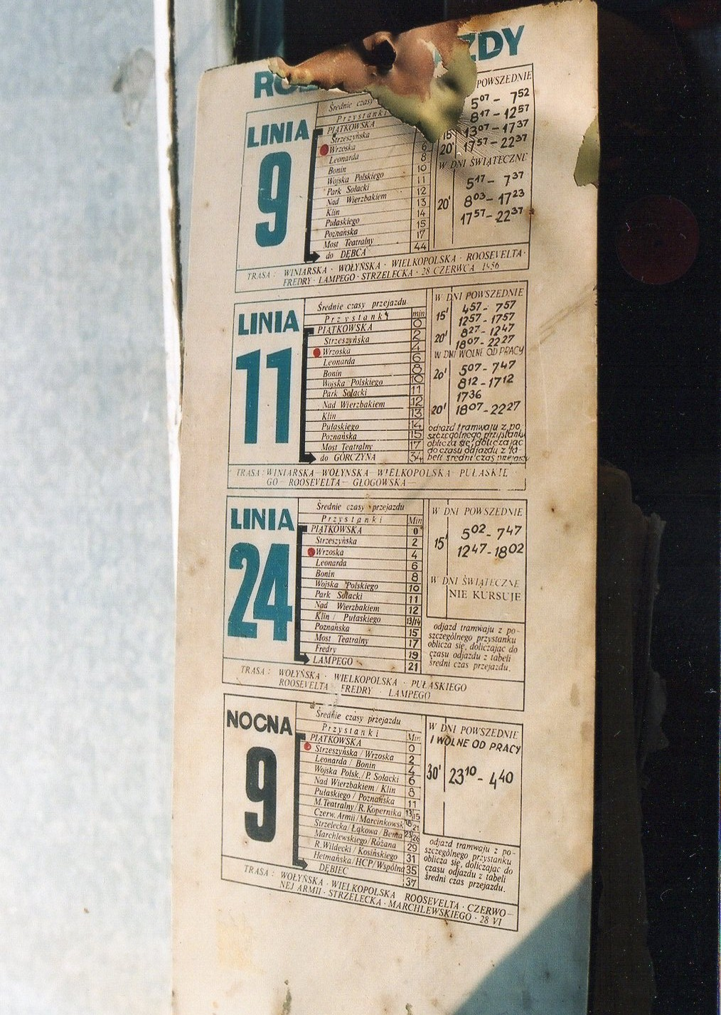 Tablice przystankowe poznańskich tramwajów z lat 90. XX wieku.